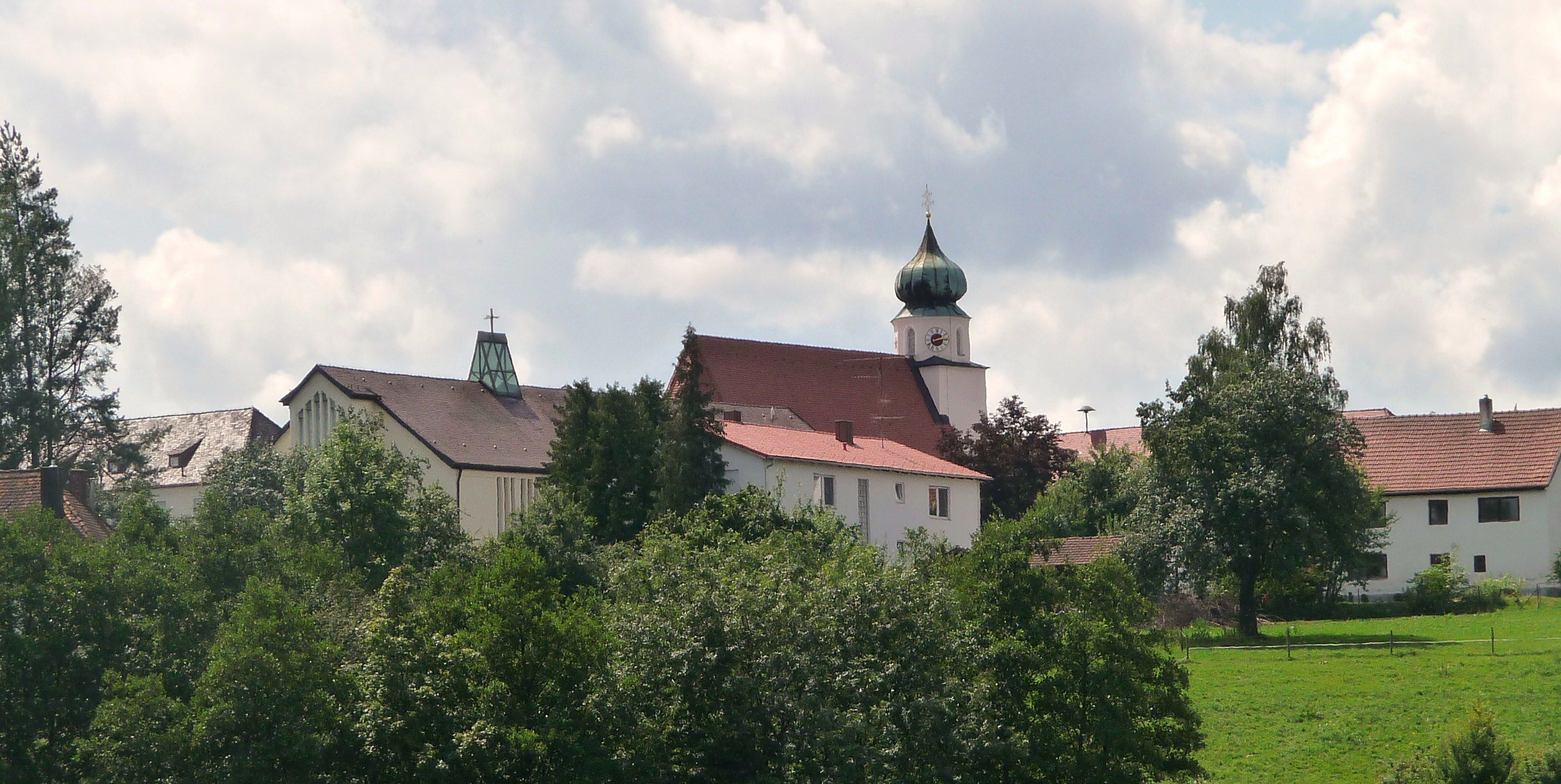 Blick auf Neustift bei Ortenburg